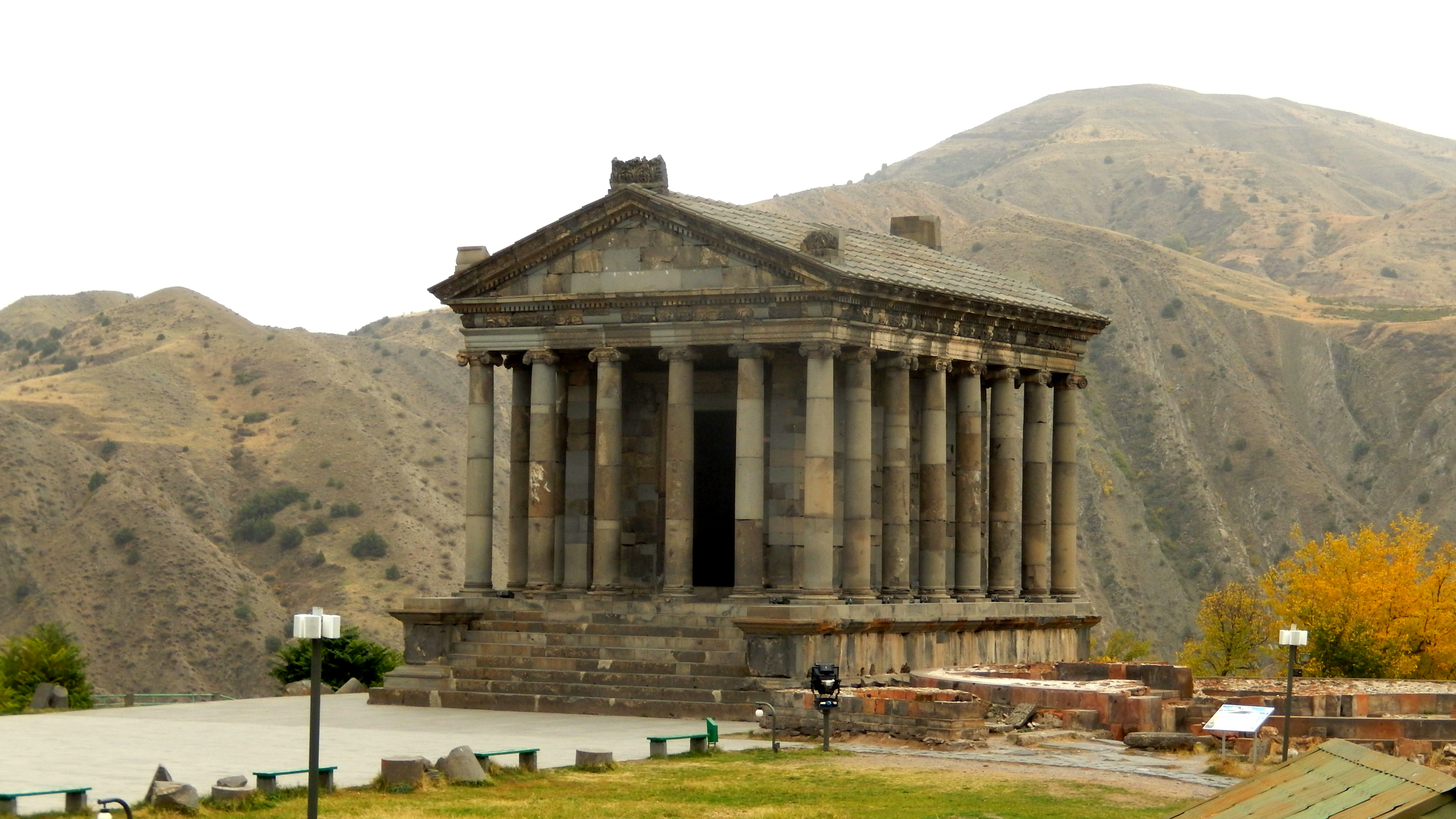 Գառնի 21/4.2